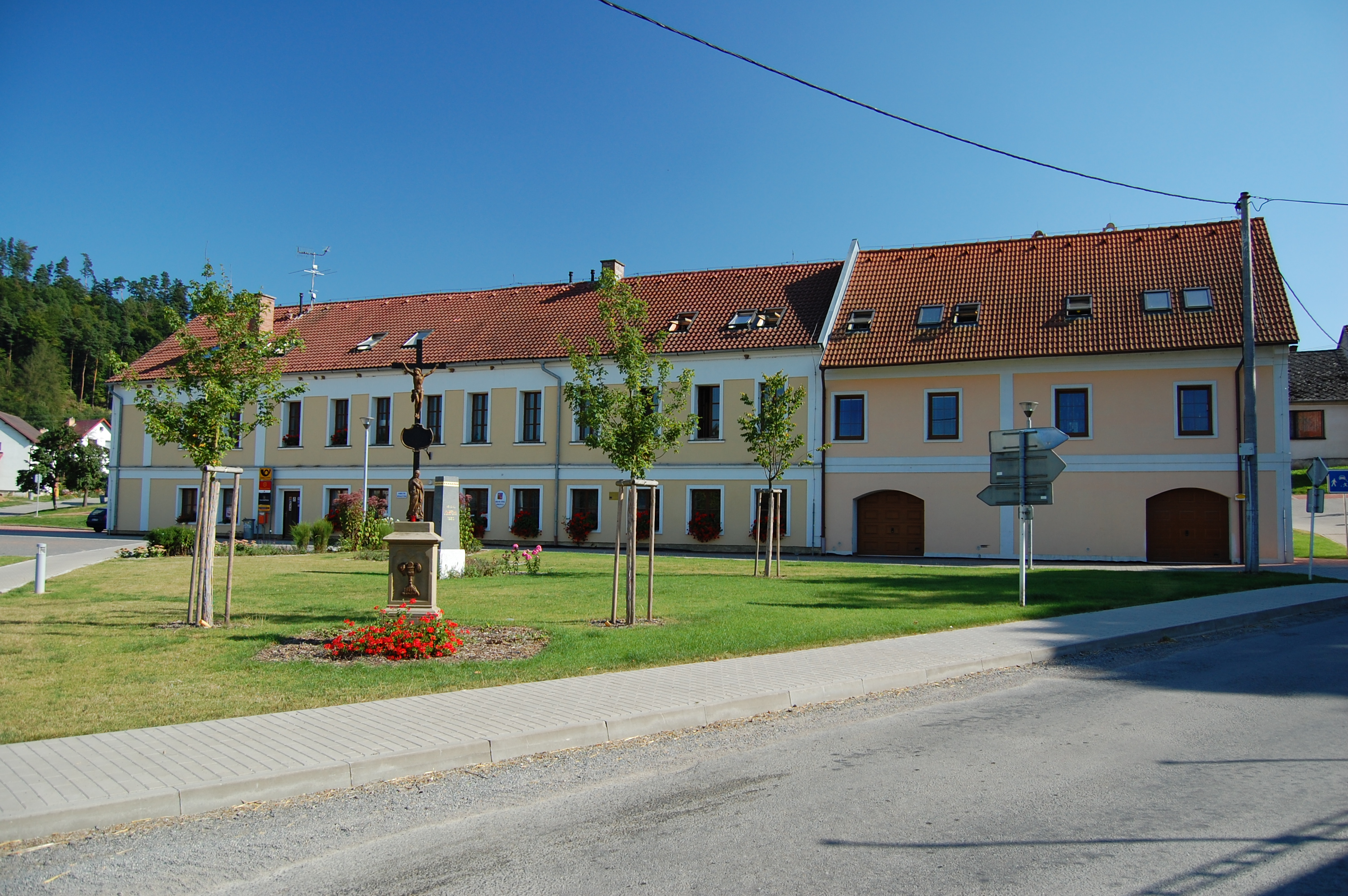 Náves s obecním úřadem, Biskupice, okres Svitavy